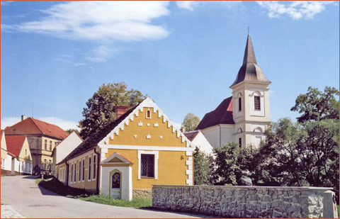 Bošilecký kostel a mostek, dům čp. 68 a výklenková kaple.